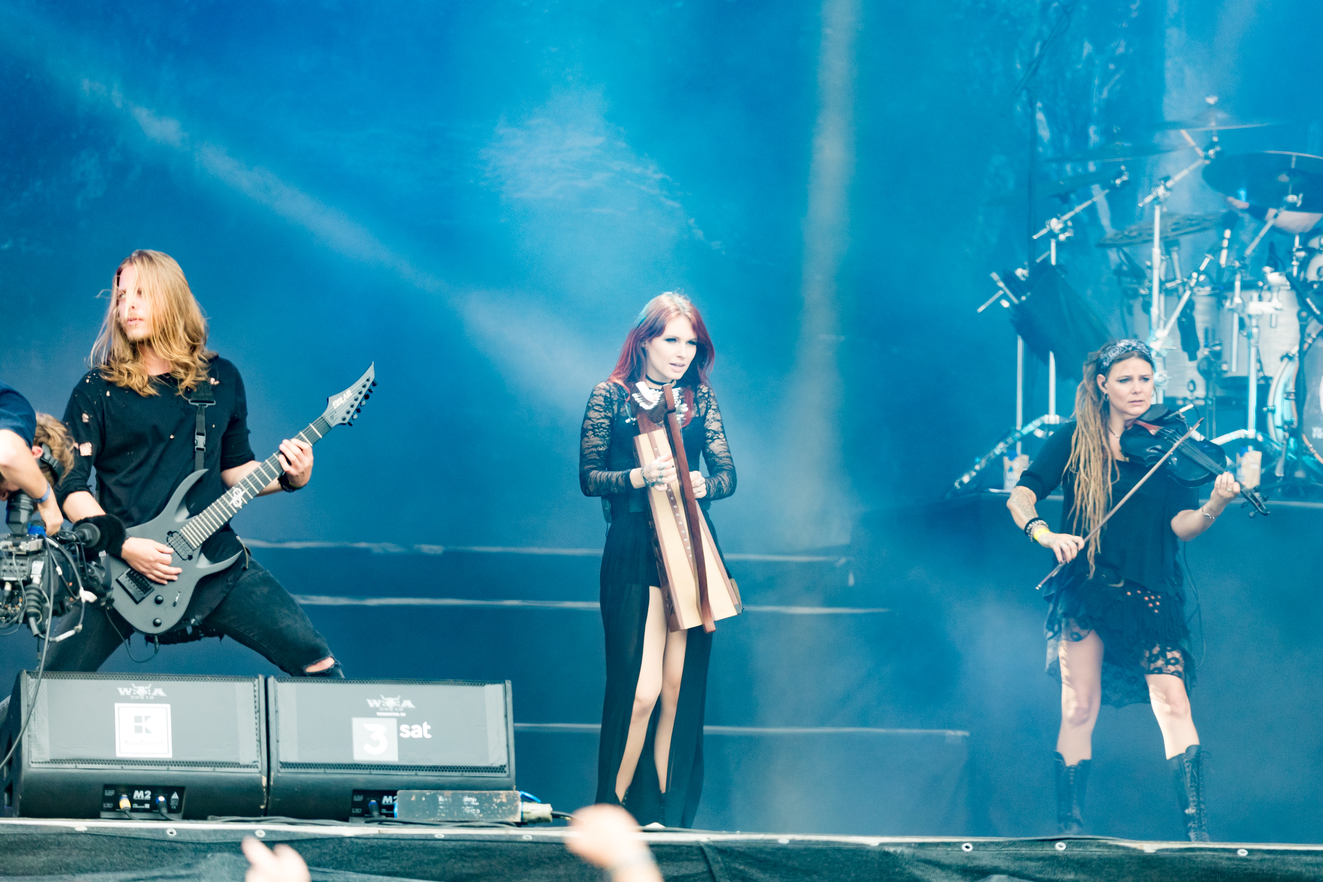 Eluveitie during Wacken Open Air at The Holy Wacken Land, Wacken, Schleswig-Holstein, Germany on 2019-08-02, Photo: Sven Mandel